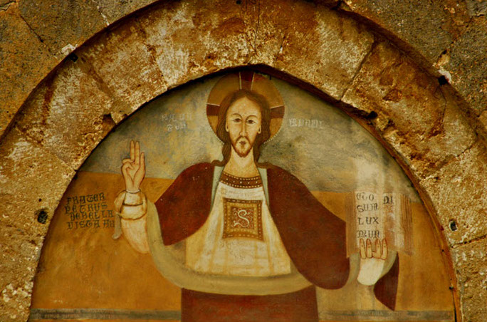 Cristo Benedicente. Affresco del sec. XIV nell'Abbazia di Santo Spirito a Caltanissetta.